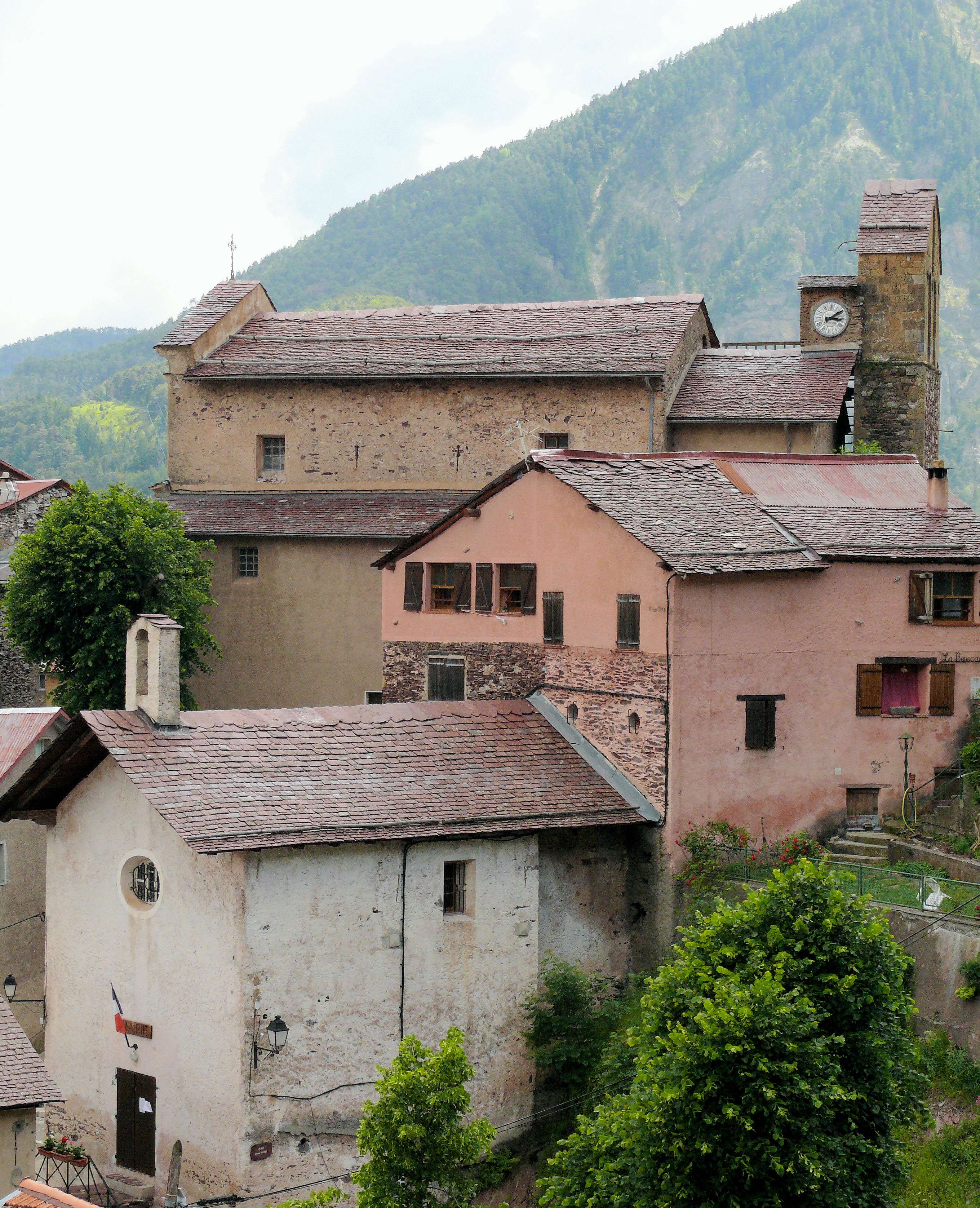 Roure - Eglise Saint-Etienne et mairie